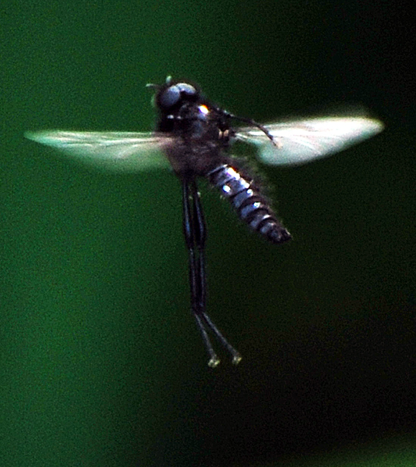 De Rouwvlieg of Maartse vlieg is eigenlijk een mug. Ze vliegen vaak massaal bij het begin van de lente. Ze bewegen traag met hun lange merkwaardige poten. Het is geen vlieg maar een muggensoort.